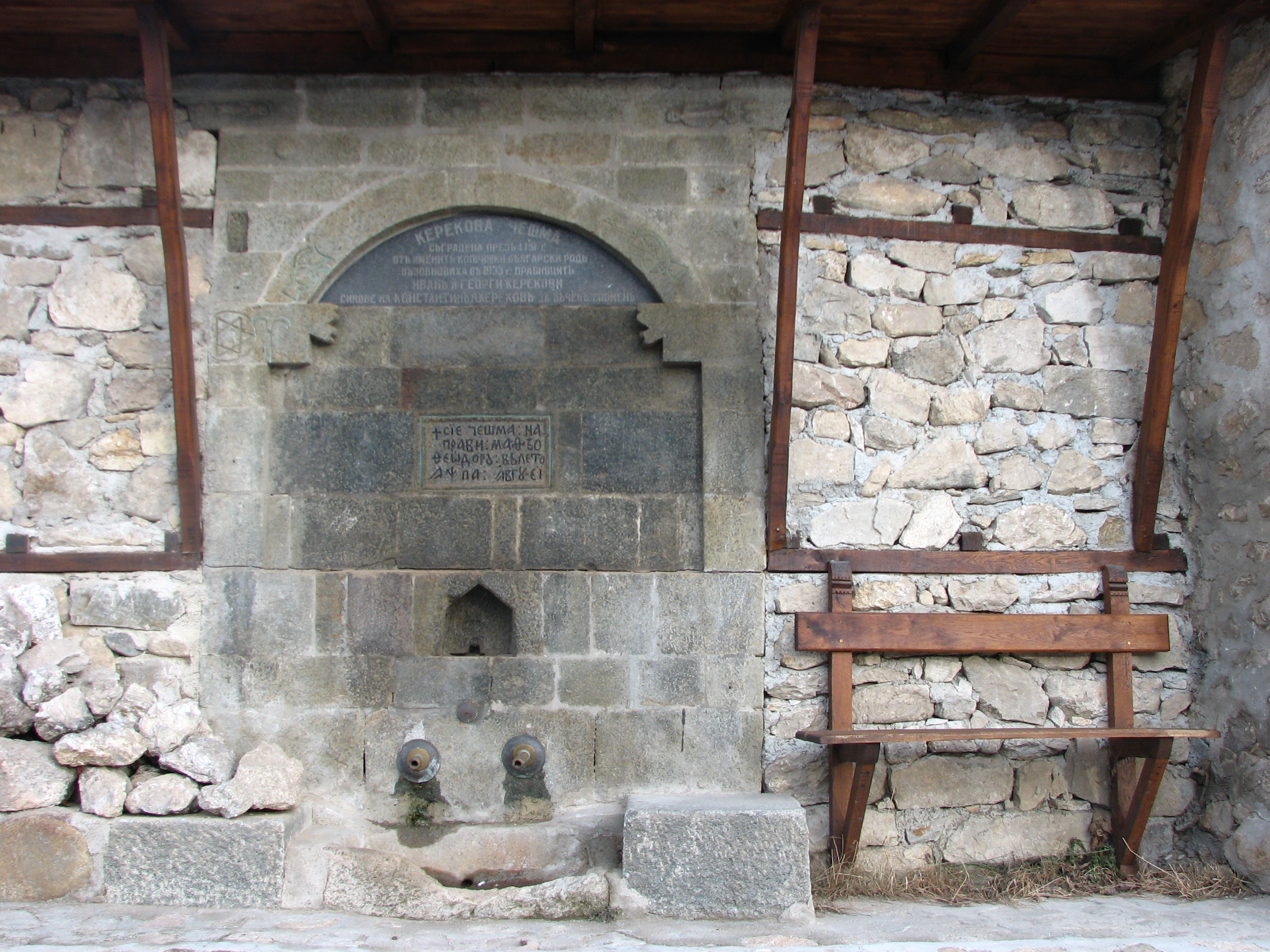 Керекова чешма